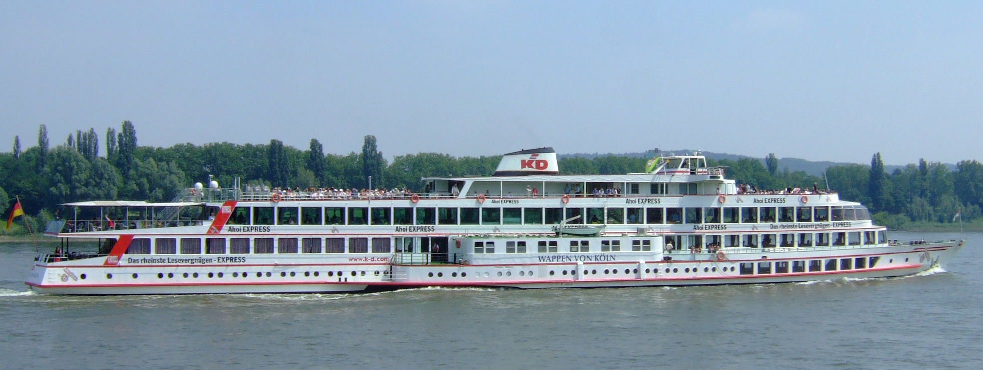 Köln-Düsseldorfer: MS Wappen von Köln